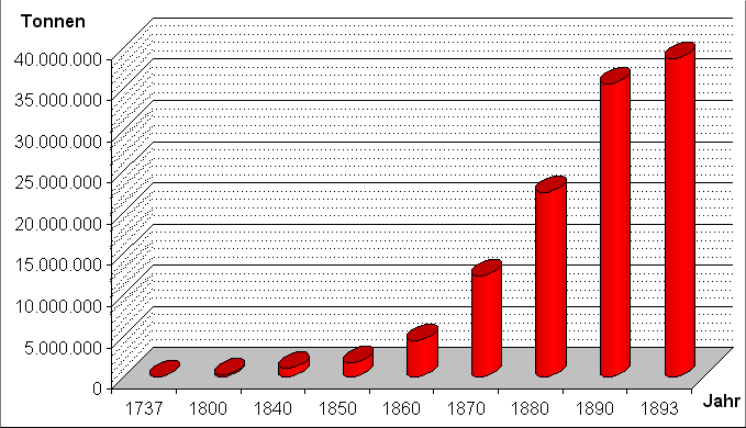 Entwicklung der Kohleförderung im „Rheinisch-Westfälischen Kohlenbecken“, grafische Darstellung der Daten nach Brockhaus' Konversationslexikon, F. A. Brockhaus in Leipzig, Berlin und Wien, 14. Auflage, 1894-1896